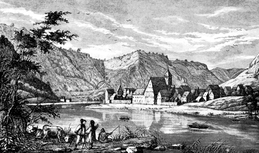 Anton Jahn: Winningen an der Mosel, 1838